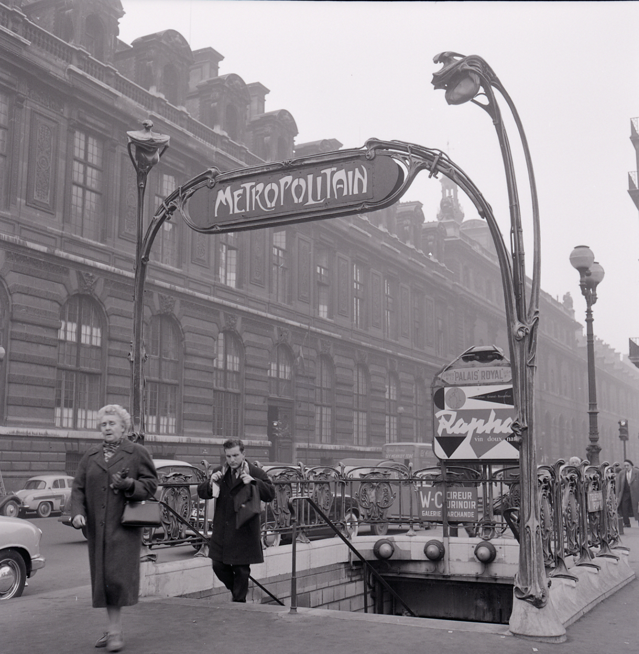 Serie fotografica : Paris, 1967 / Paolo Monti. - Buste: 36, Fototipi: 36 : Negativo b/n, gelatina bromuro d'argento/ pellicola ; 6x6. - ((Serie costituita da 36 buste di carta, tenute insieme da una graffetta, identificate con i nn.: R10872, R10873, R10874, R10875, R10876, R10877, R10878, R10879, R10880, R10881, R10882, R10883, R10884, R10885, R10886, R10887, R10888, R10889, R10890, R10891, R10892, R10893, R10894, R10895, R10896, R10897, R10898, R10899, R10900, R10901, R10902, R10903, R10904, R10905, R10906, R10907. - Sulla busta R10872: "Metro Parigi"